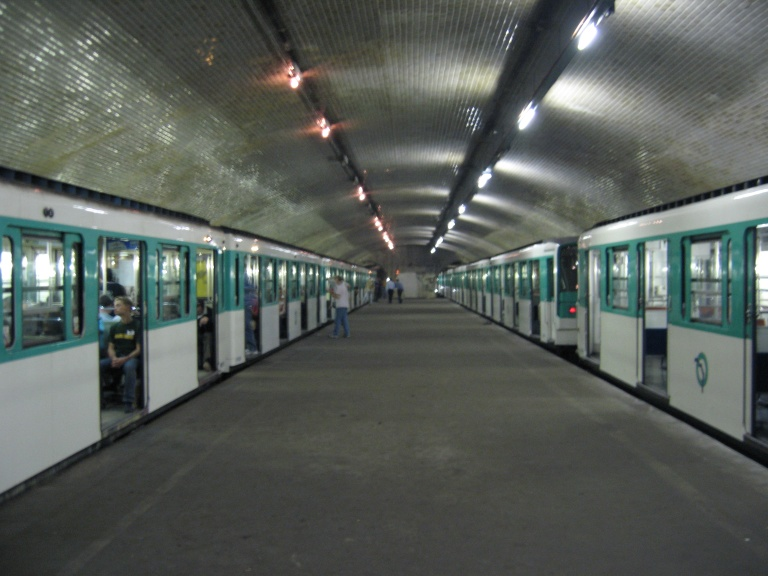 Journées du patrimoine RATP 16-17/09/2006. Station fantôme de Porte Molitor.